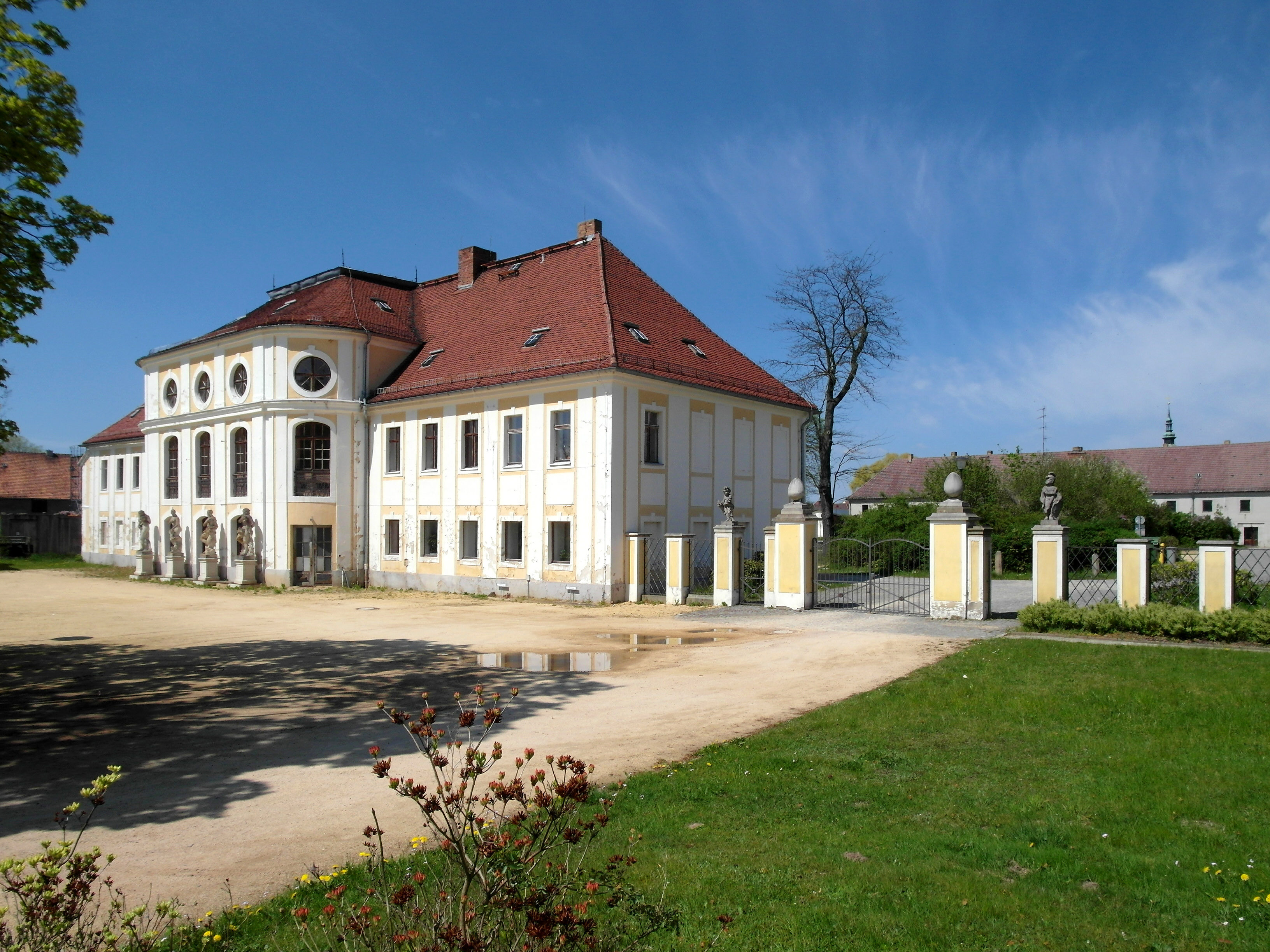 06.05.2016 02699 Königswartha: Schloß, Gutsstraße 1 (GMP: 51.307568,14.326858):. Parkseite mit der Parktoranlage. Das heutige spätbarock-frühklassizistische Schloß wurde von 1780 bis 1796 für Johann Friedrich Graf von Dallwitz errichtet, der im Fertigstellungsjahr starb. Es folgten bürgerliche Besitzer, deren Letzter, Herbert Kluge 1945 enteignet wurde. Seit Ende der 1940er Jahre dient das Schloß u.a. der Fachschule für Binnenfischerei. [SAM5707.JPG]20160606425DR.JPG(c)Blobelt Hornjoserbsce: Rakečanski hród